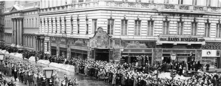 Scherl: Letzte Fahrt des Reichsministers Dr. Todt. In einem ergreifenden Staatsakt nahm der Führer und das deutsche Volk Abschied von dem genialen Reichsminister Dr. Todt. Die Spitzen des öffentlichen Lebens wohnten der Feier im Mosaik-Saal der Neuen Reichskanzlei bei. Auf dem Wege von der Neuen Reichskanzlei zum Invaliden-Friedhof stand die Bevölkerung Berlins Spalier, um Dr. Todt die letzte Ehre zu erweisen. Unser Bild zeigt den Sarg auf der Geschütz-Lafette. Er war unmittelbar gefolgt von Generalfeldmarschall Keitel, Grossadmiral Raeder und Generalfeldmarschall Milch. Dahinter folgten Reichsleiter, Reichsminister, Gauleiter, Staatssekretäre und die Generalität. Information added by Wikimedia users.